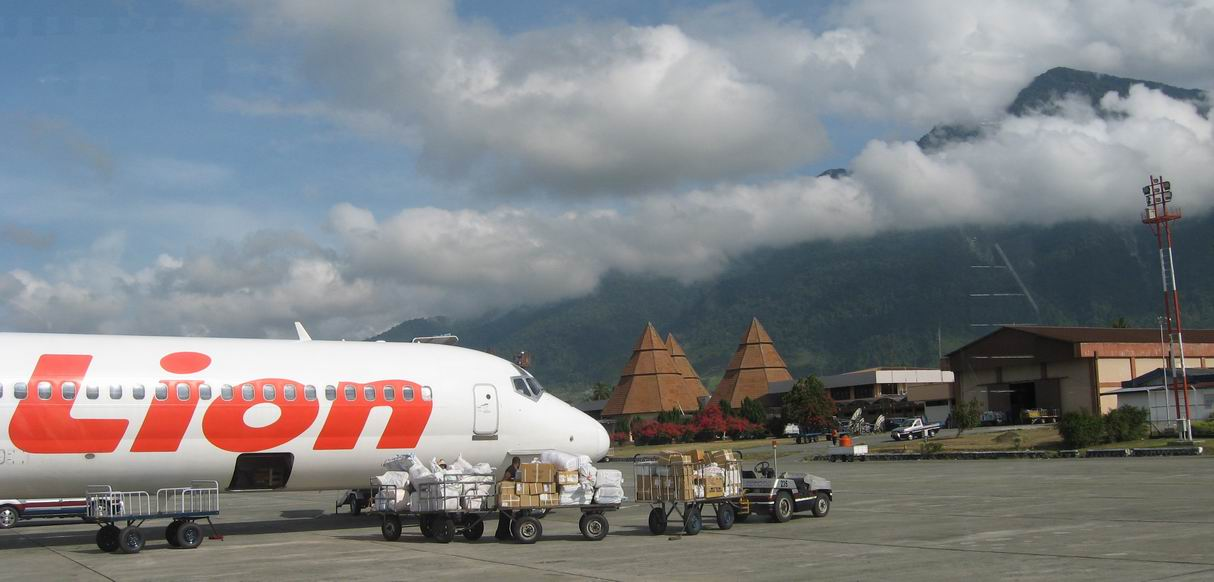 Lion Air parking at Sentani Airport of Jayapura, Papua